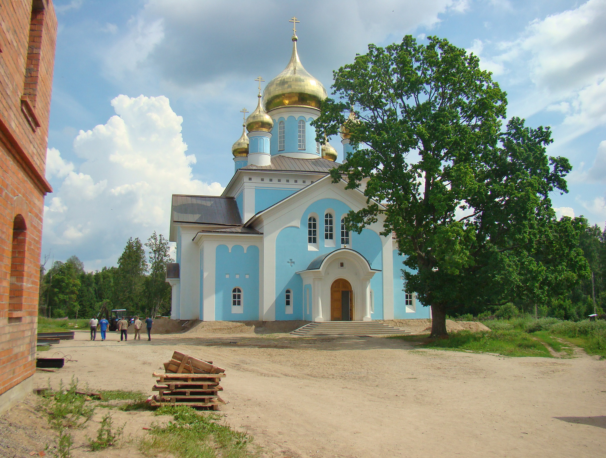 Благовещенский собор Никандровой пустыни